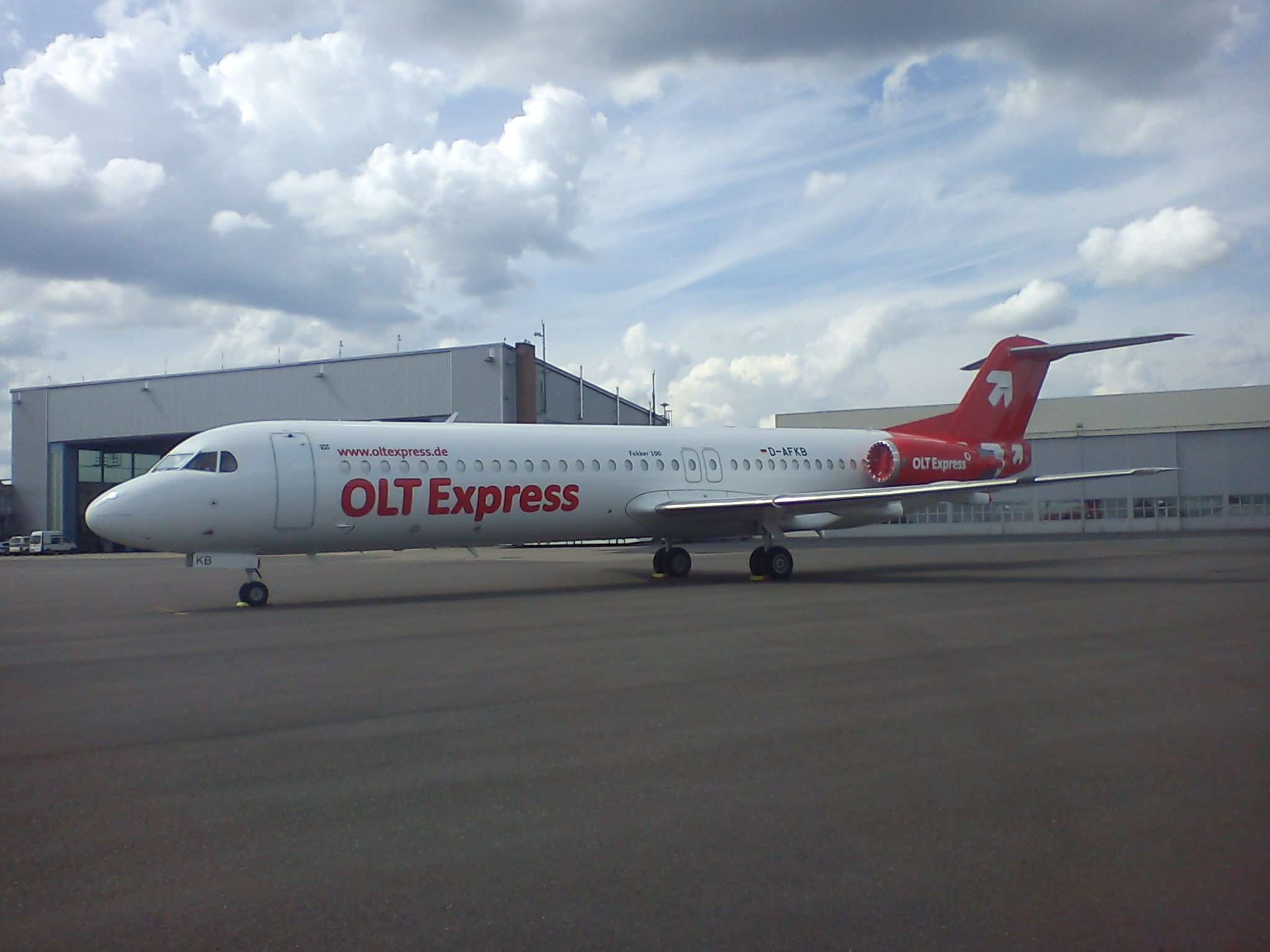 Ehemalige Contact-Air Fokker 100, die im Rahmen der noch laufenden Übernahme die OLT-Express Lackierung erhielt. Fotografiert am Flughafen Saarbrücken